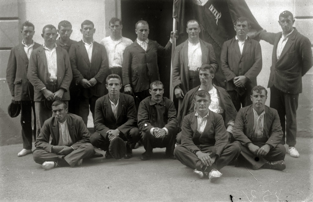 Título original: Regatas de traineras en la bahía de la Concha (5/127) Localización: San Sebastián (Guipúzcoa)